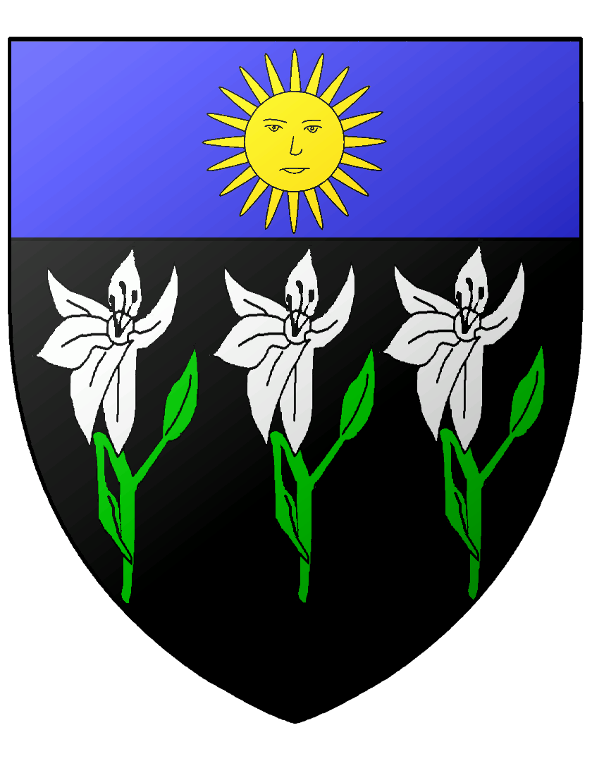 Blason de la Corporation des jardiniers de Paris (France)